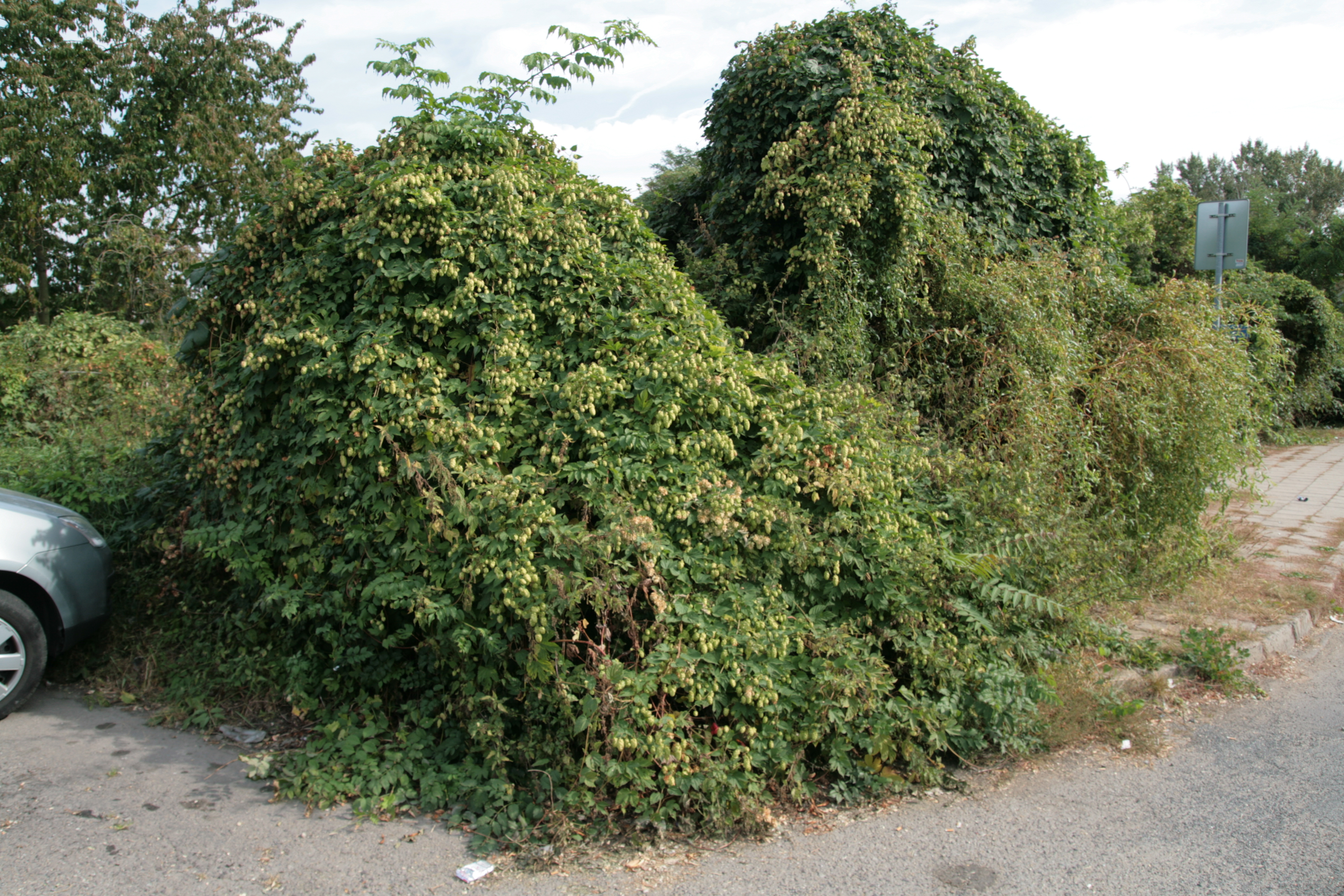 Železniční stanice Hrušovany nad Jevišovkou v Nádražní ulici, na katastrálním území obce Šanov, okres Znojmo. Křovina rostoucí před nádražím.